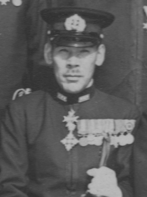 矢野英雄海軍中将。軍艦長門艦上